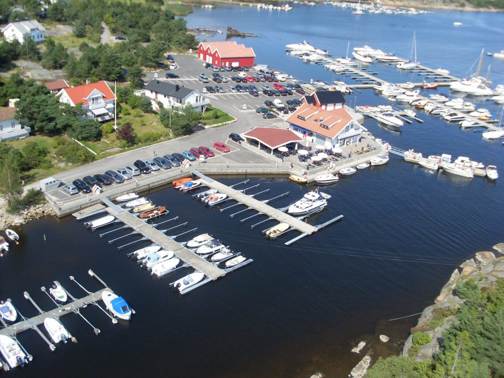 Bilde av den vakre marinaen Sand Marina